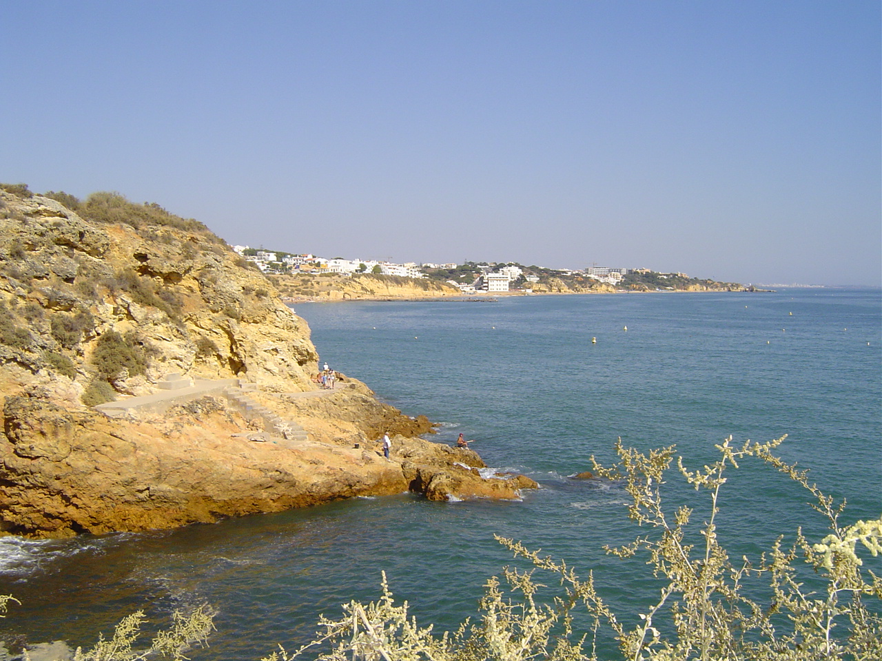 Foto tirada do passeio marginal.